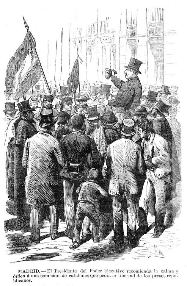 Madrid, el presidente del Poder ejecutivo recomienda la calma y orden a una comisión de catalanes que pedía la libertad de los presos republicanos, en la revista española La Ilustración Española y Americana.